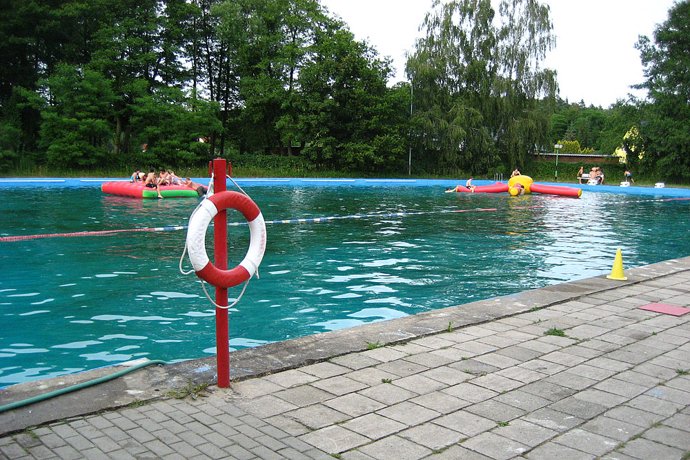 Freibad Hammermühle, Schwimmerbecken am 01.07.2010